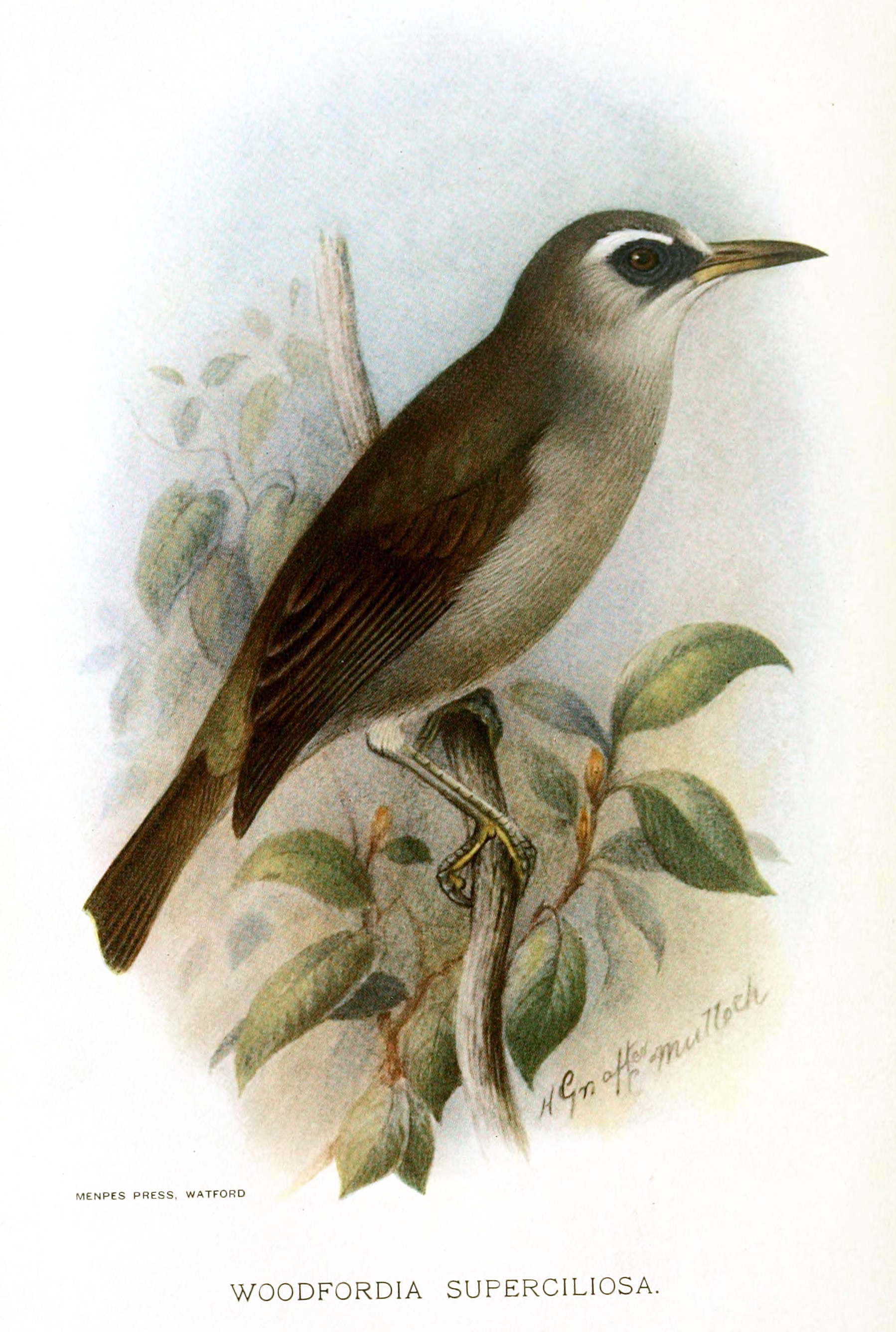 Woodfordia superciliosa